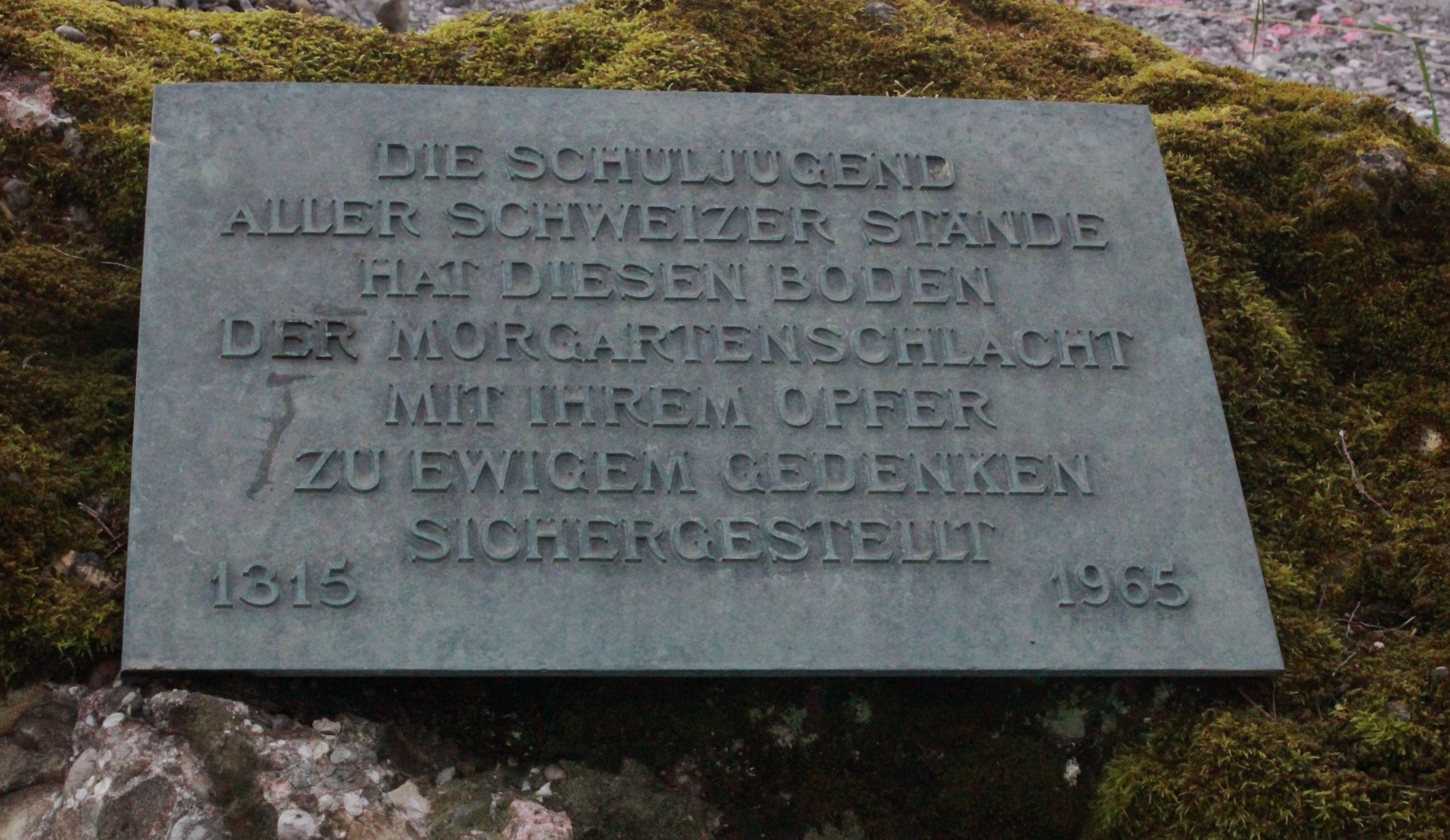 Erklärungstafel zum Erwerb des Schlachtgeländes von Morgarten durch die Stiftung der Schweizer Schuljugend anlässlich der 650-Jahr-Feier 1965.